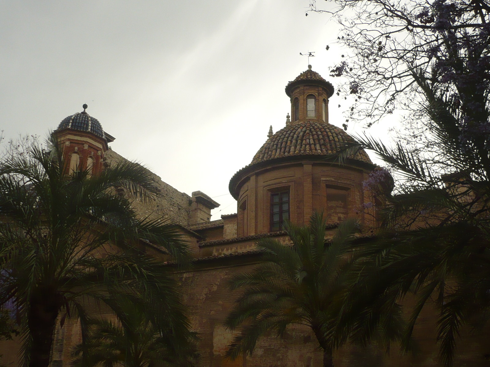 Vista de la Iglesia del Carmen de valencia, desde el jardín contiguo.